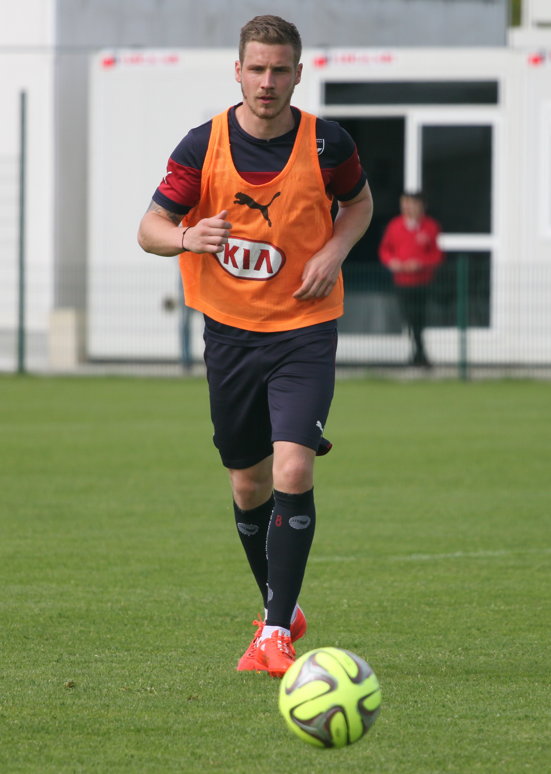 Sertic à l'entraînement.